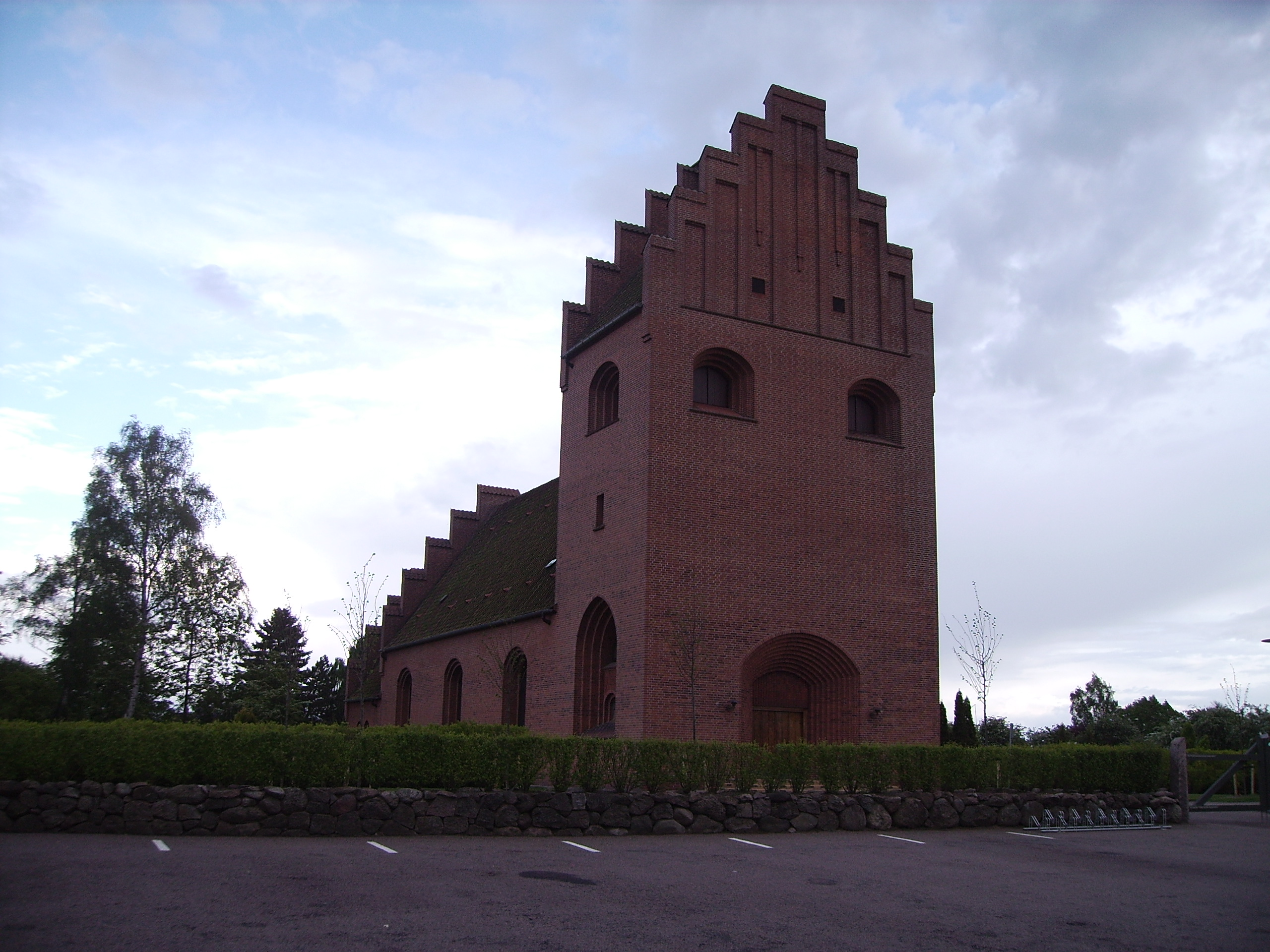 Næsby Kirke, Næsby Sogn, Odense Herred, Odense Amt, Denmark (Danish Church) Date: 31.05.2006 Photographed by Søren Møller